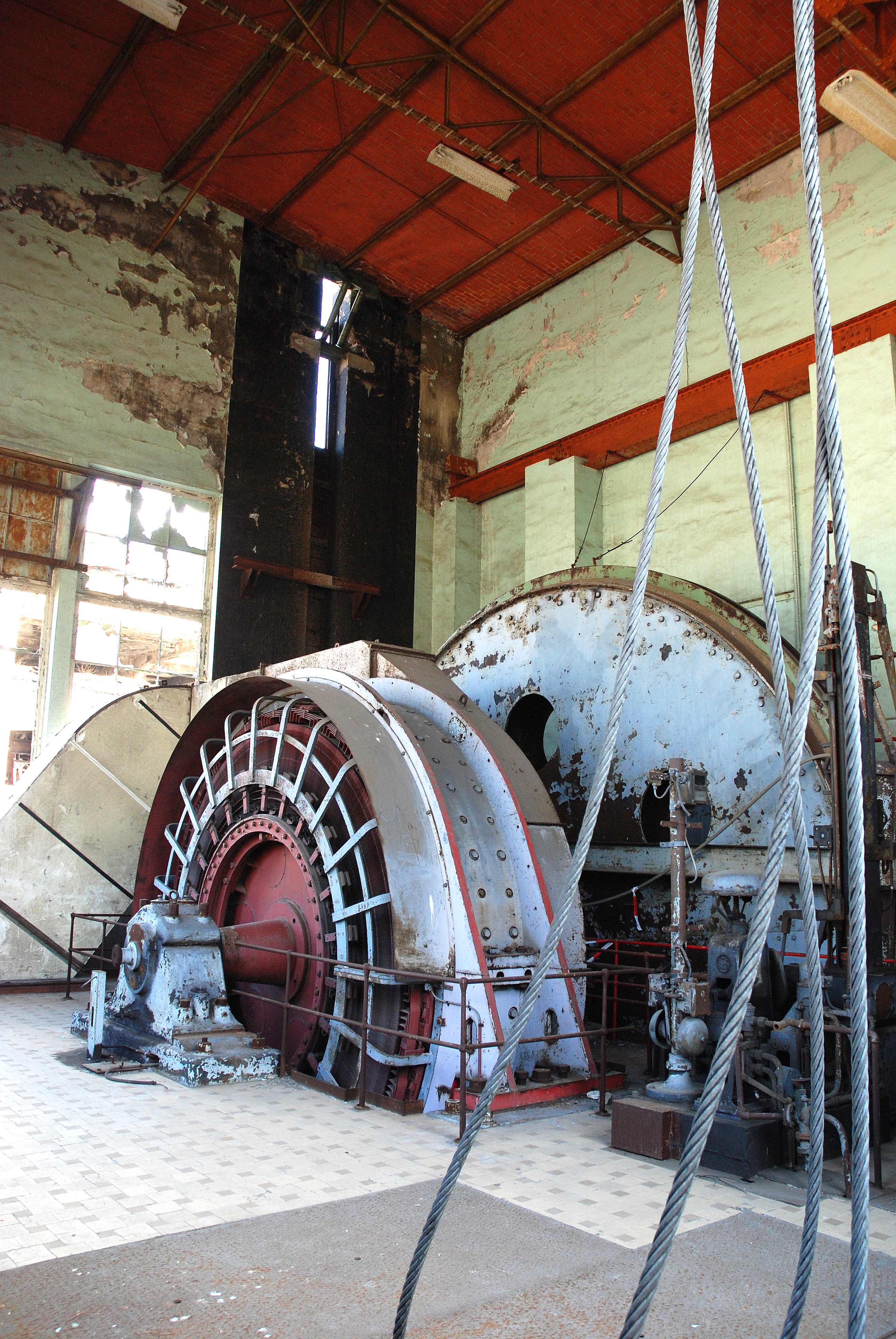 Ophaalmachine met Koepeschijf in de steenkoolmijn te Waterschei, België